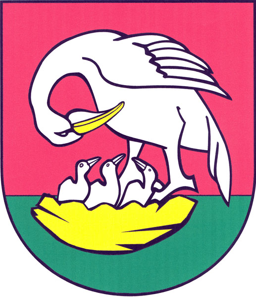 Znak obce Holetín